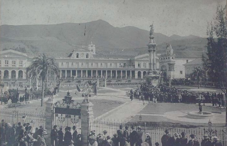 Plaza de la Independencia de Quito, hacia 1909